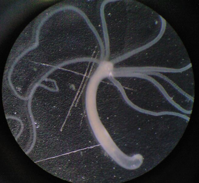 ヒドロ虫綱・花クラゲ目ヒドラ科 投稿者本人が双眼実体顕微鏡を用いて撮影 Google translation: "Filmed with a binocular stereomicroscope his eyes From School hydra jellyfish Hydrozoa Flowers"